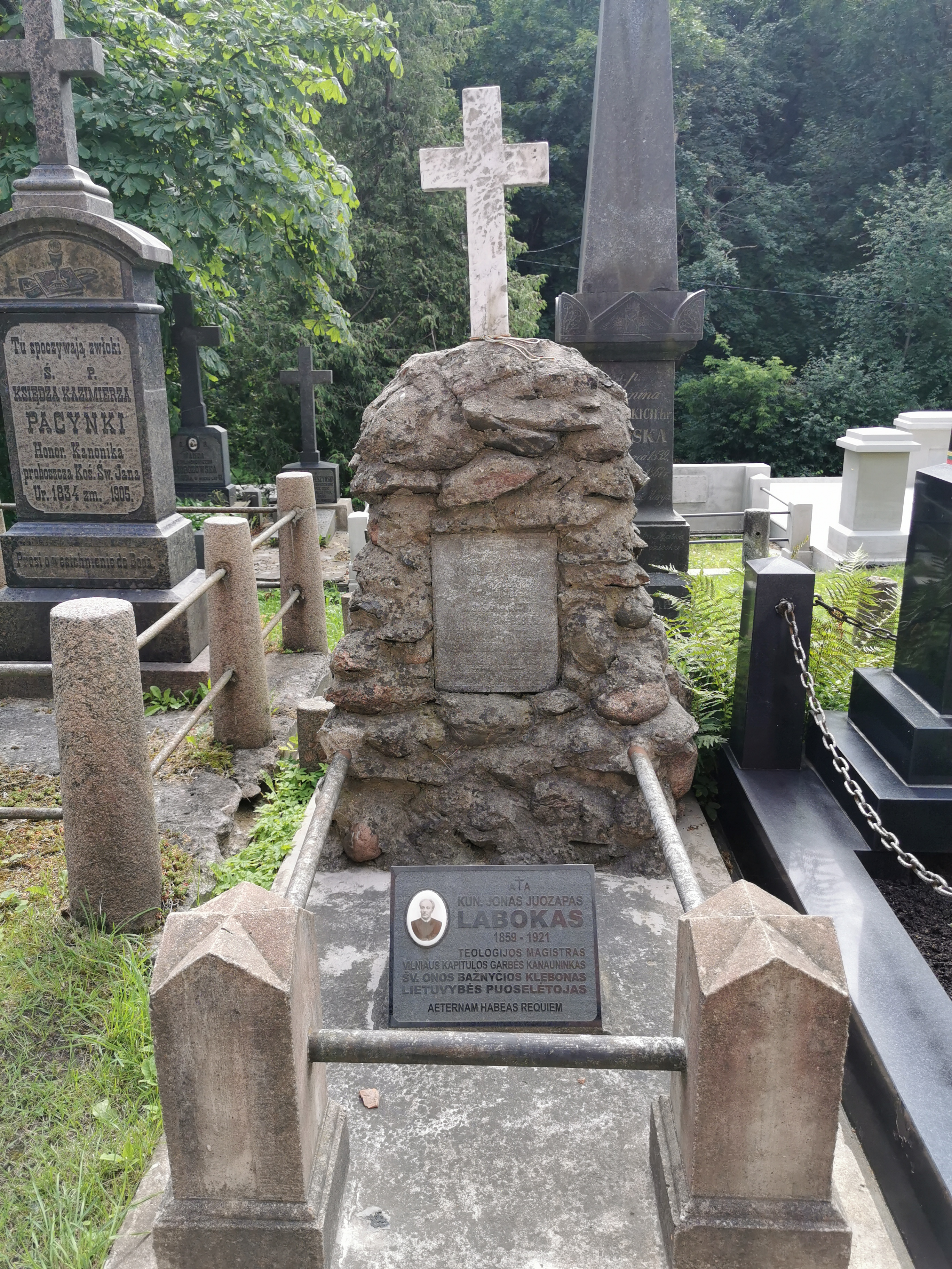 Jono Juozapo Laboko antkapis. Jonas Labokas (~1856 m. – 1921 m. spalio 4 d. Vilniuje) – Romos katalikų kunigas Lietuvoje ir Rusijoje, vienas garsiausių to meto pamokslininkų.